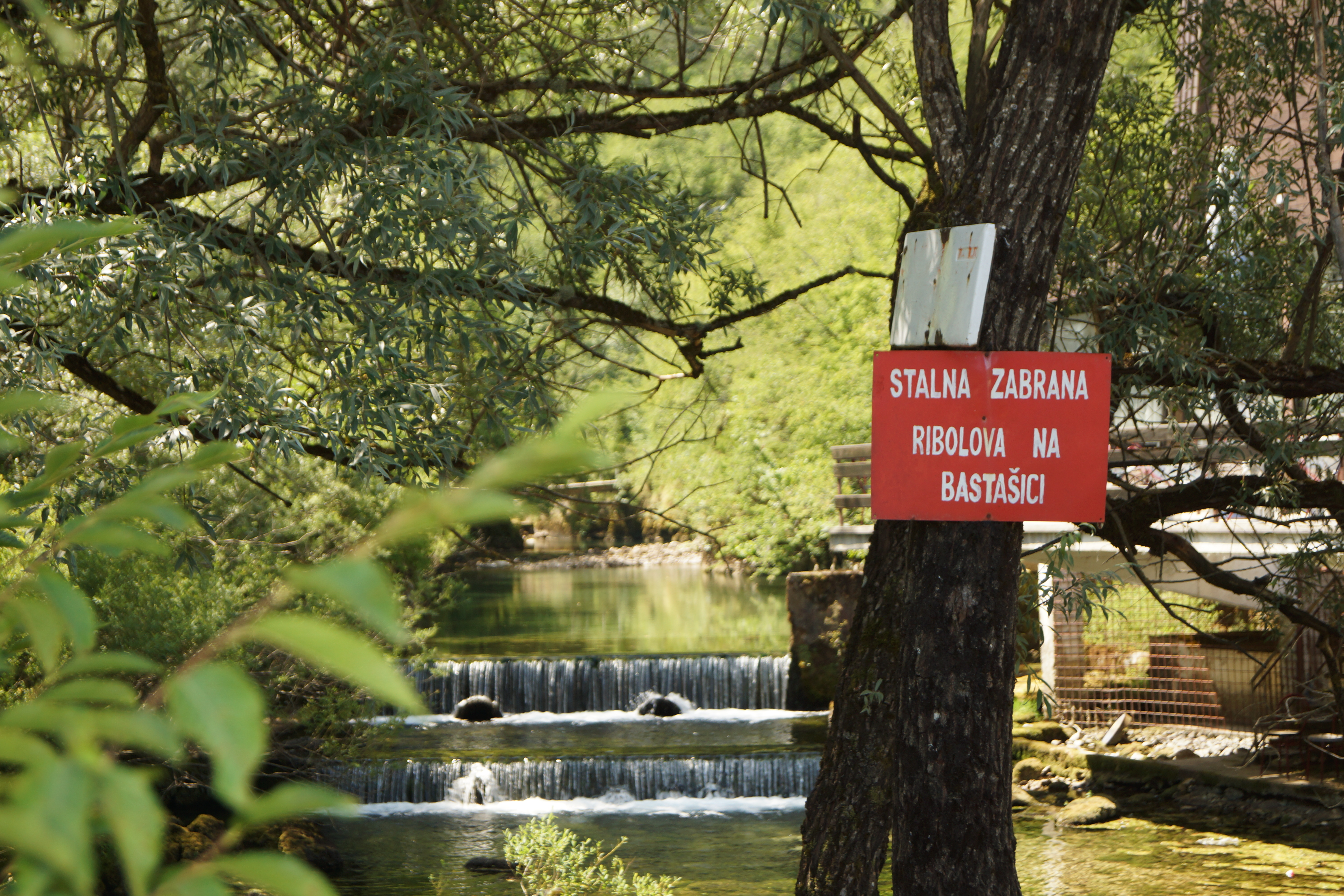 Reka Bastasica